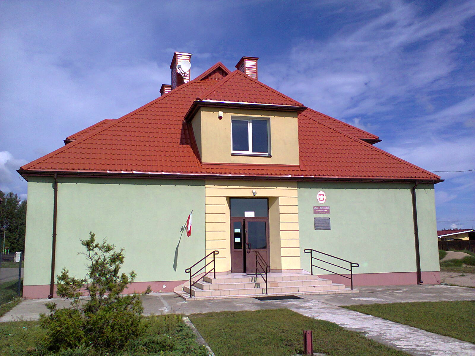 Szkoła podstawowa w Łączkach (powiat ostrołęcki)